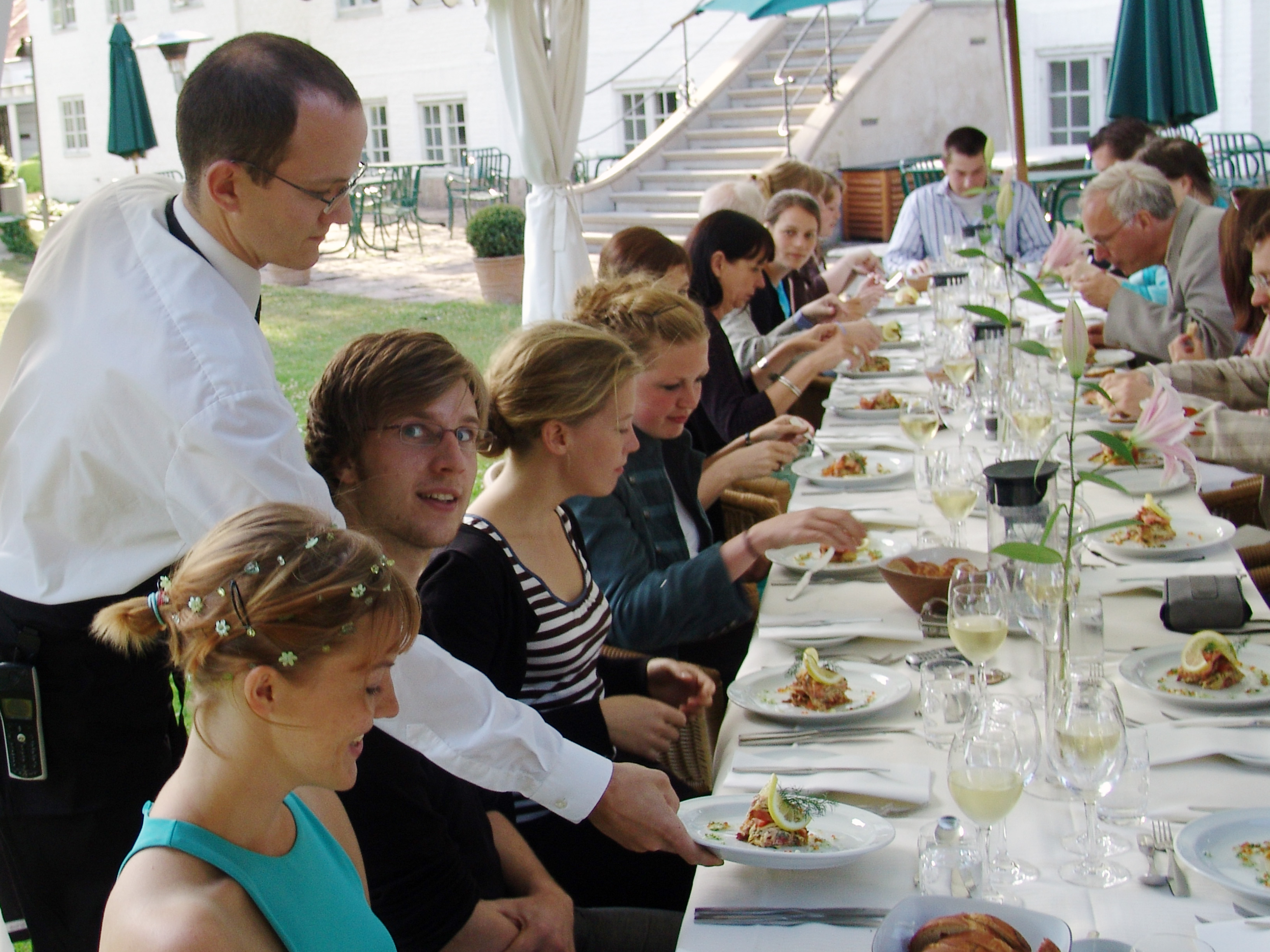 Norske studenter på sommerkurs på Schæffergården